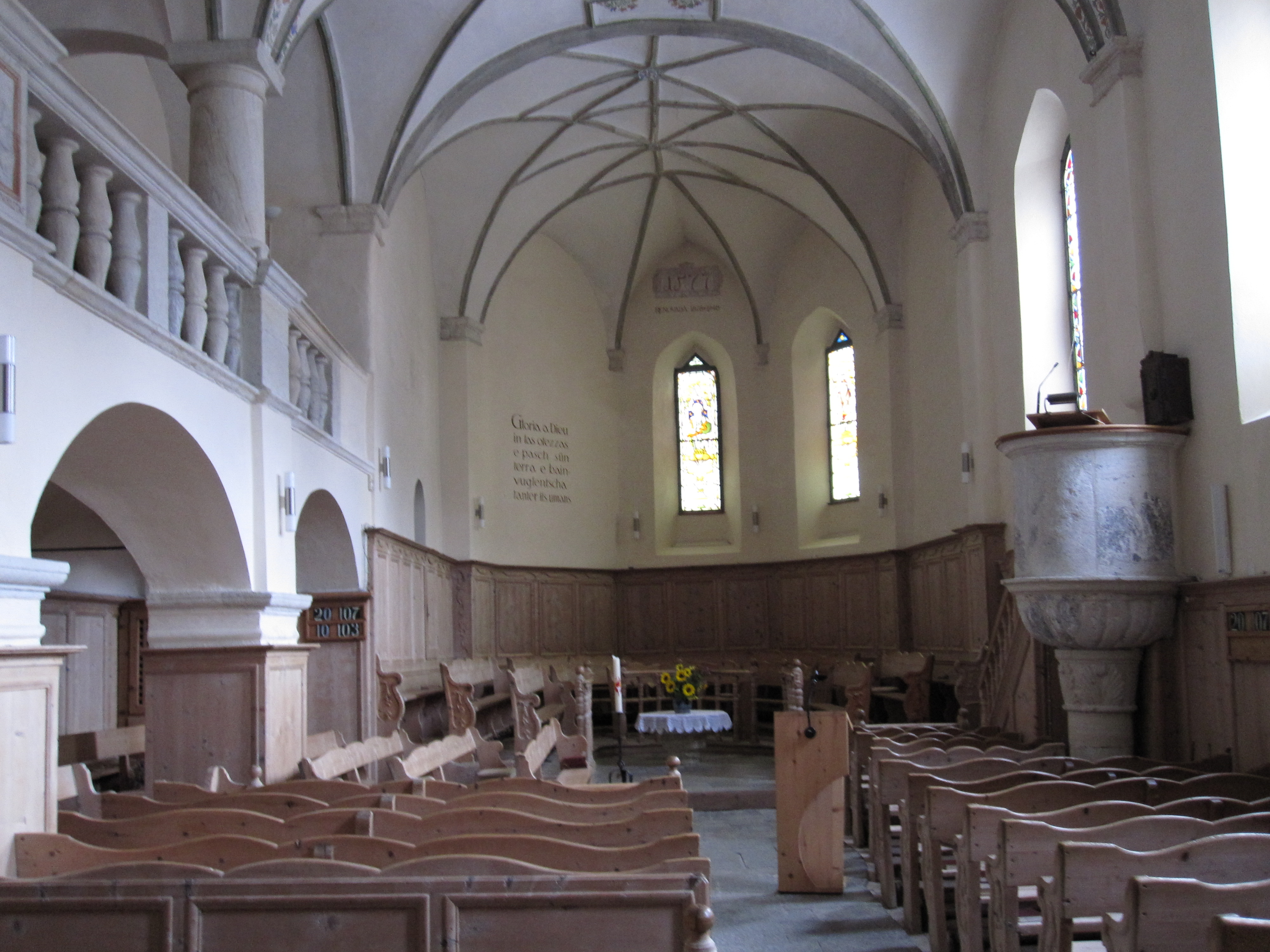 reformierte Kirche in Ardez (Kanton Graubünden)